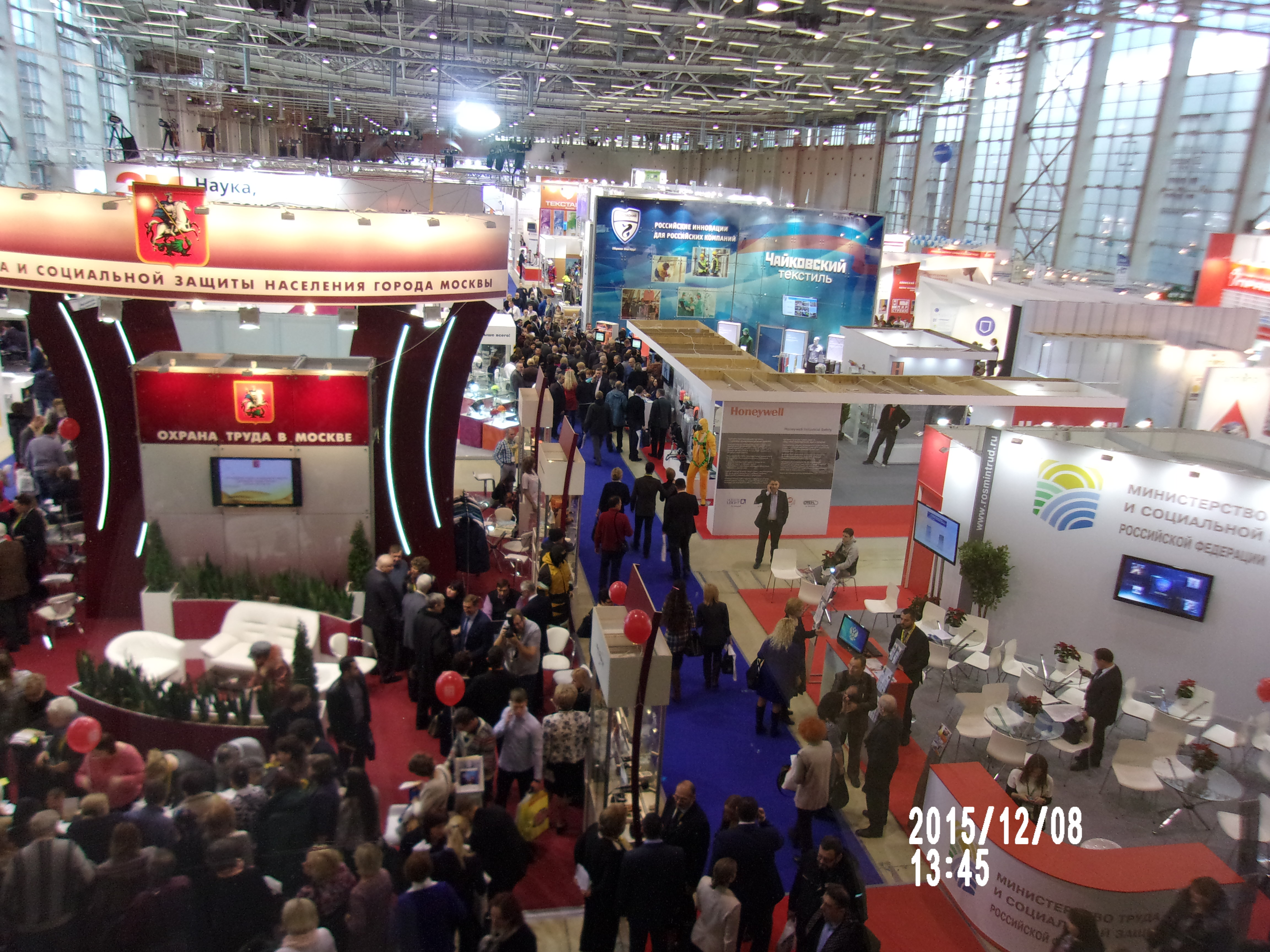 Вид на помещение павильона со стендами участников выставки